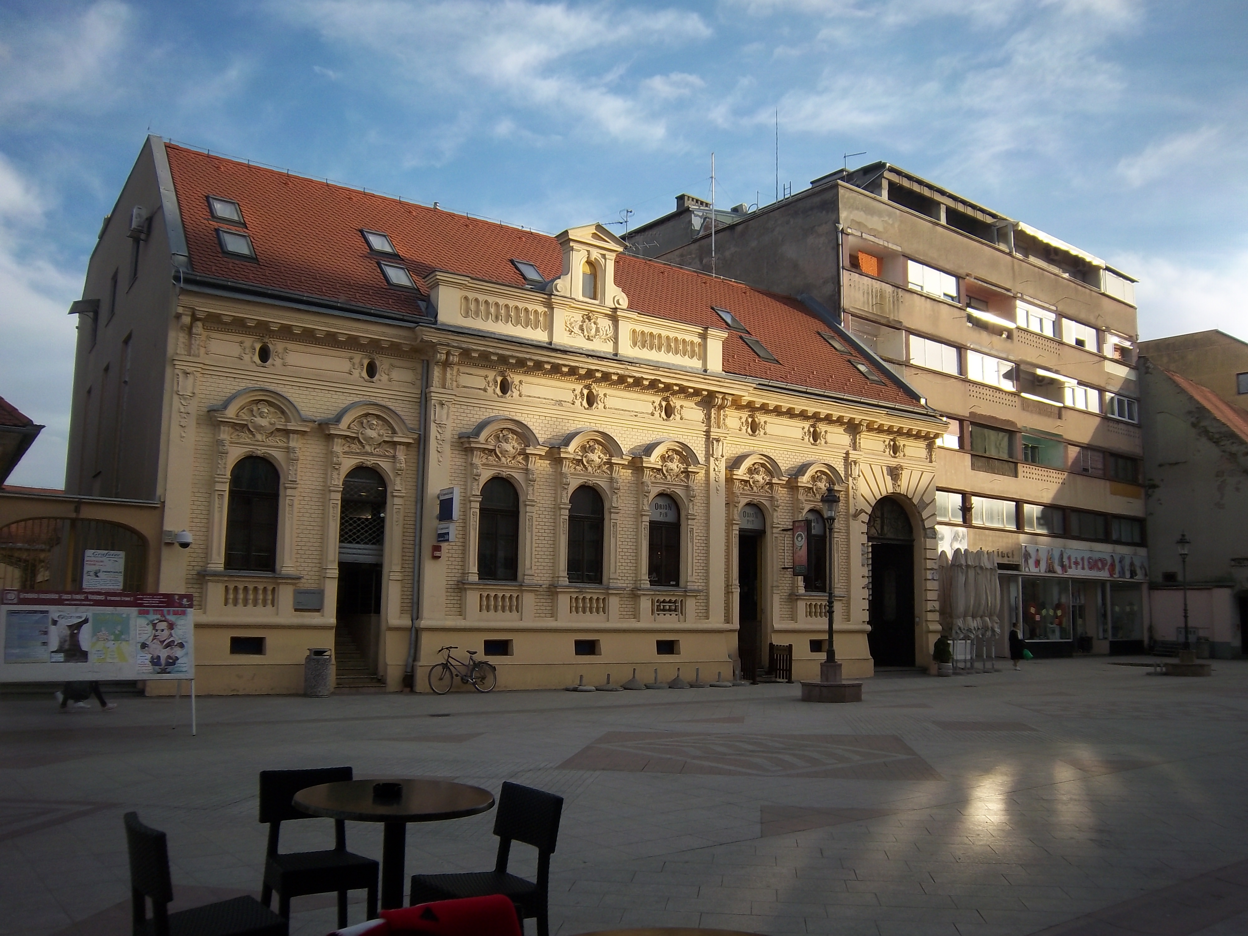 Srpskohrvatski / српскохрватски: Vinkovci u istočnoj Hrvatskoj (centar).